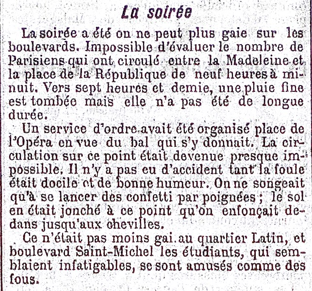 Description de la soirée de la Mi-Carême 1895 à Paris.